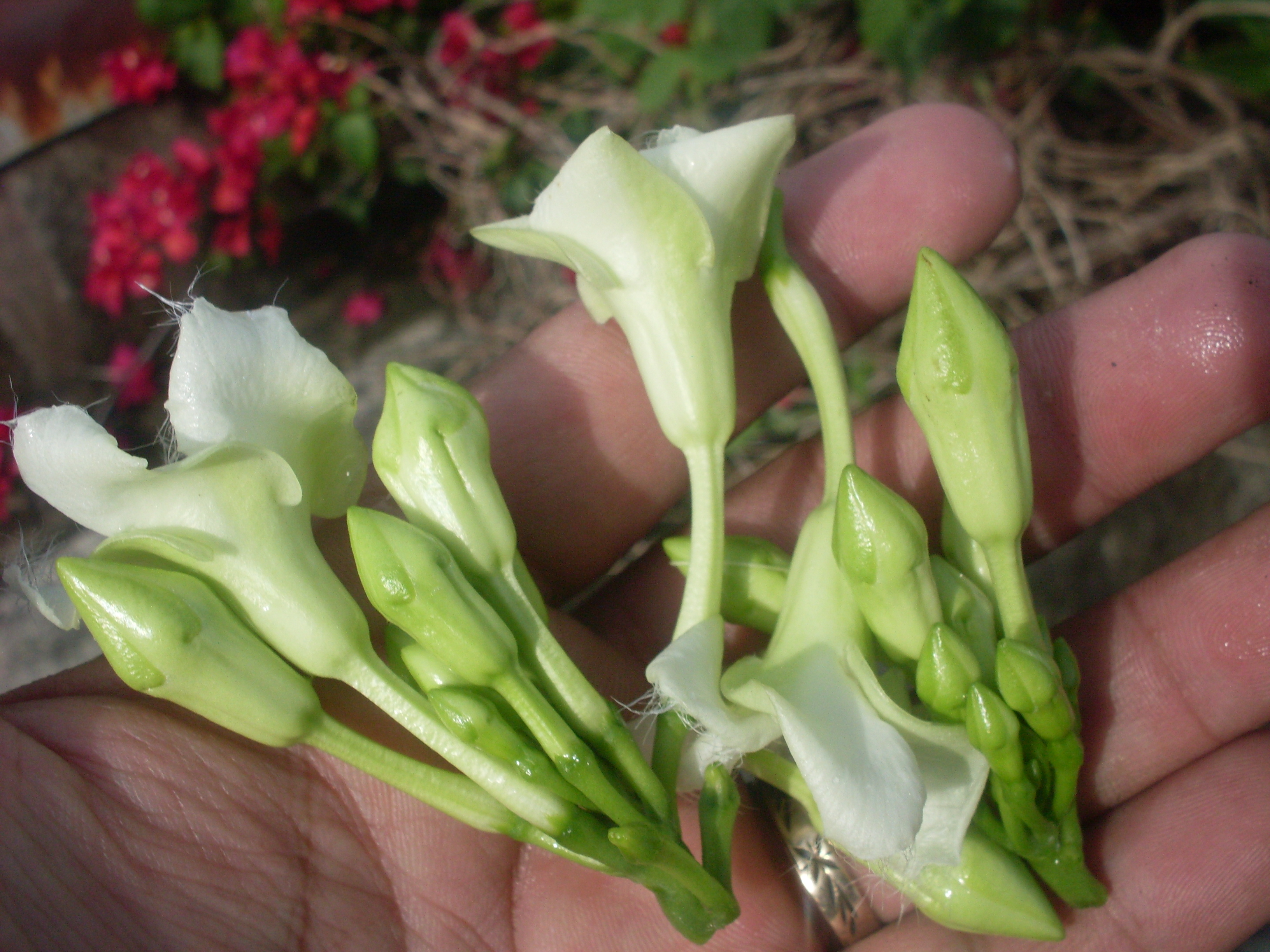 Loroco nativo de El Salvador 3